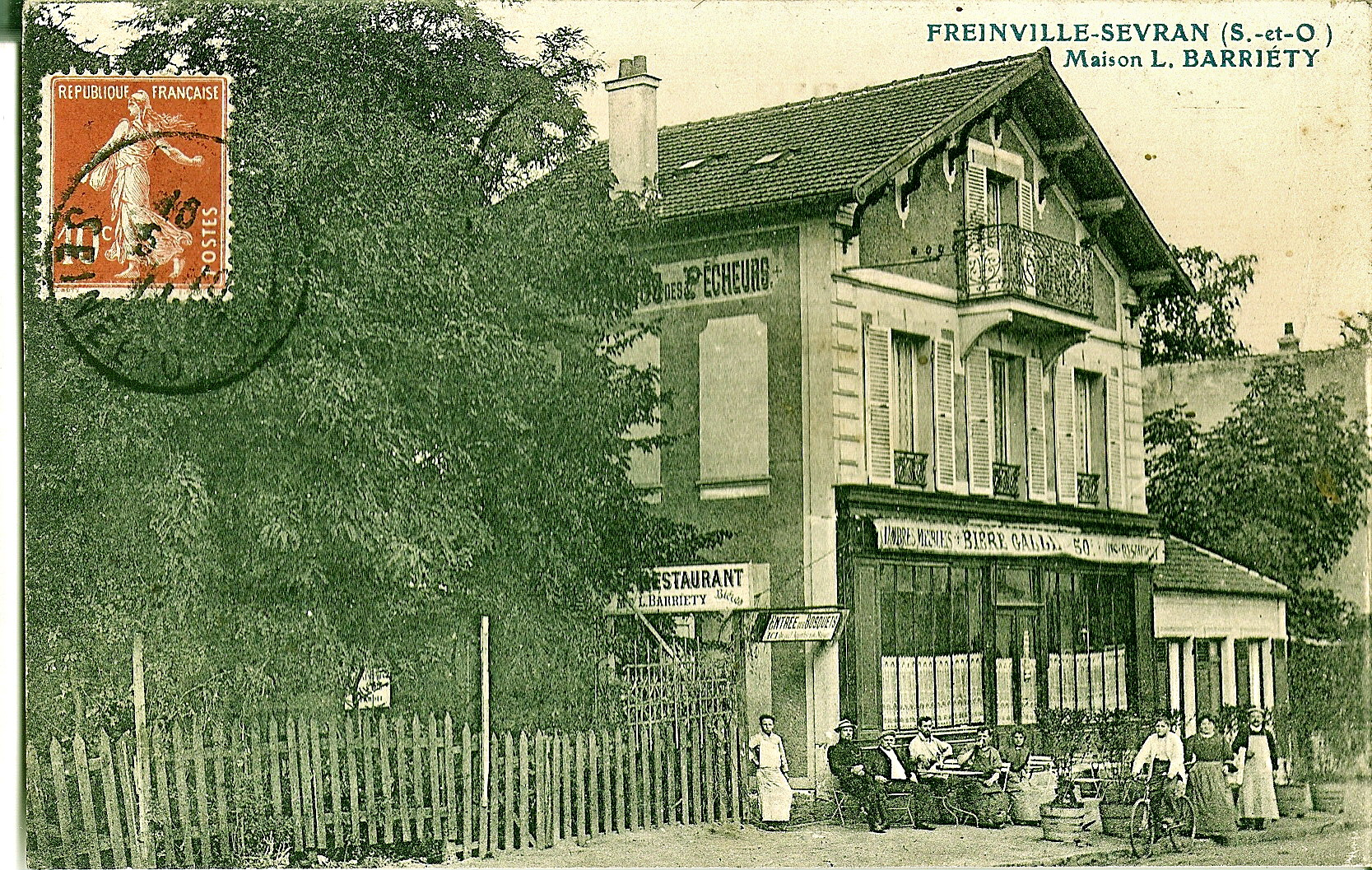 Carte postale ancienneFEINVILLE-SEVRAN - Maison L. BarriétyRestaurant guingette (on voie l'entrée des "bosquets", à l'enseigne ???? des Pécheurs